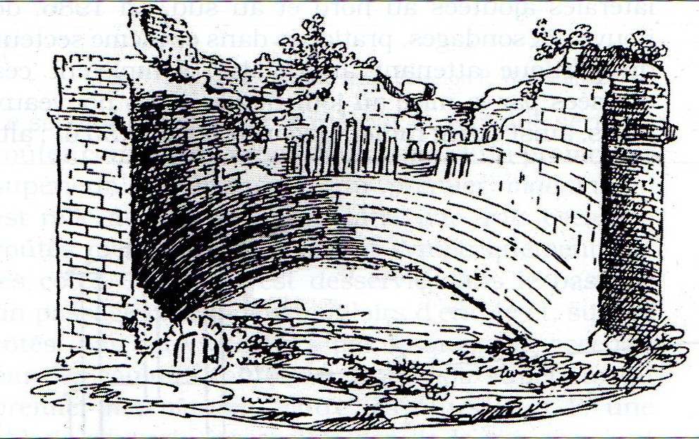 Odéon antique de Lyon. Dessin des ruines réalisé par Gabriel Syméoni en 1560 pour son manuscrit L’origine e le antichità di Lione